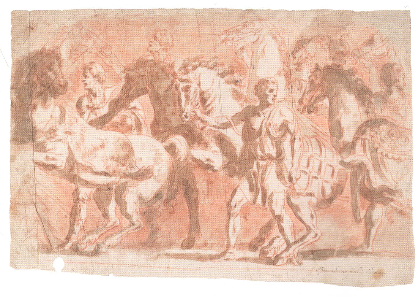 Kabinet grafike HAZU